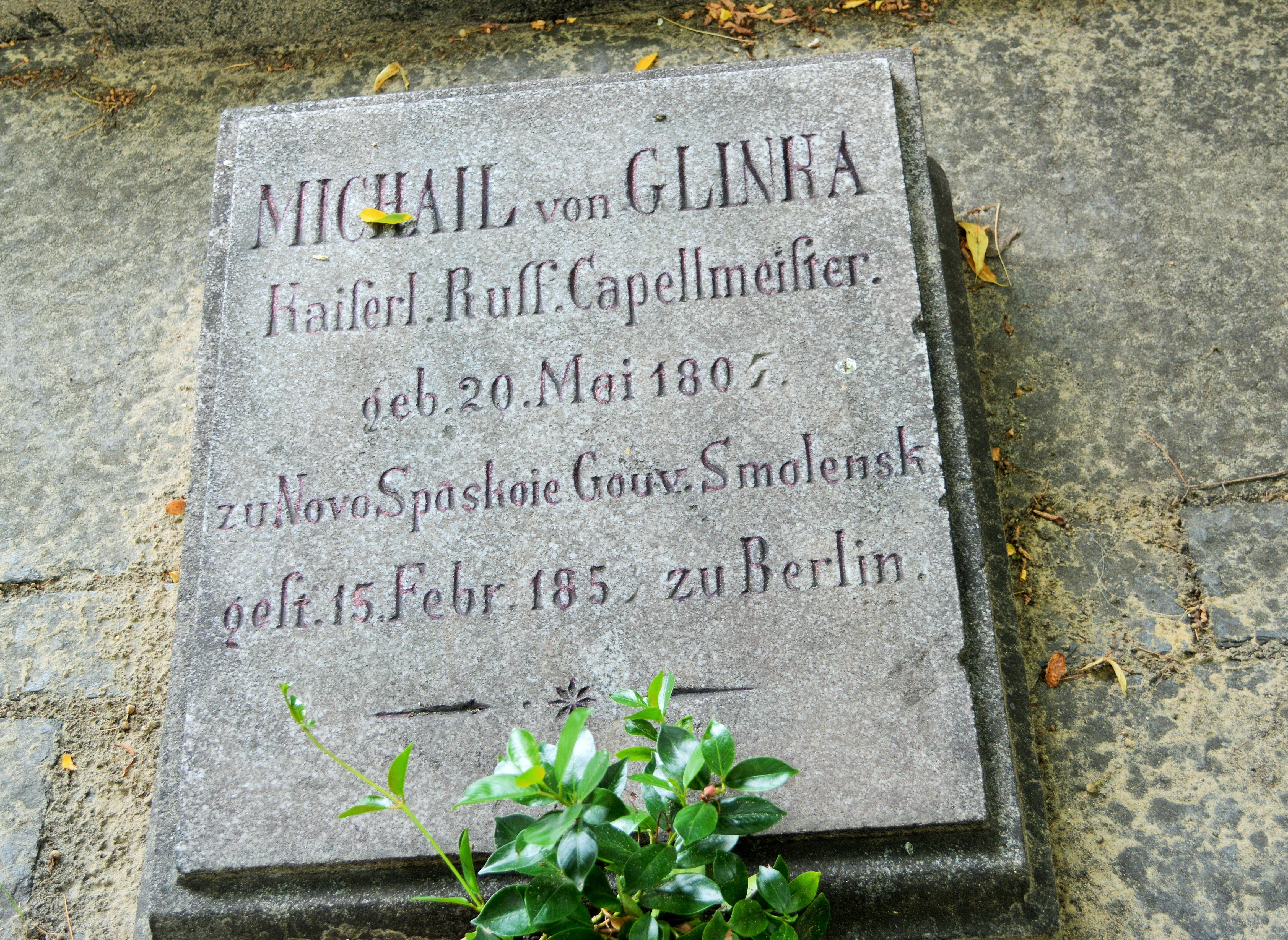 Gedenkplatte am Denkmal für den russischen Komponisten Michail Glinka auf dem Russisch-Orthodoxen Friedhof Berlin-Tegel